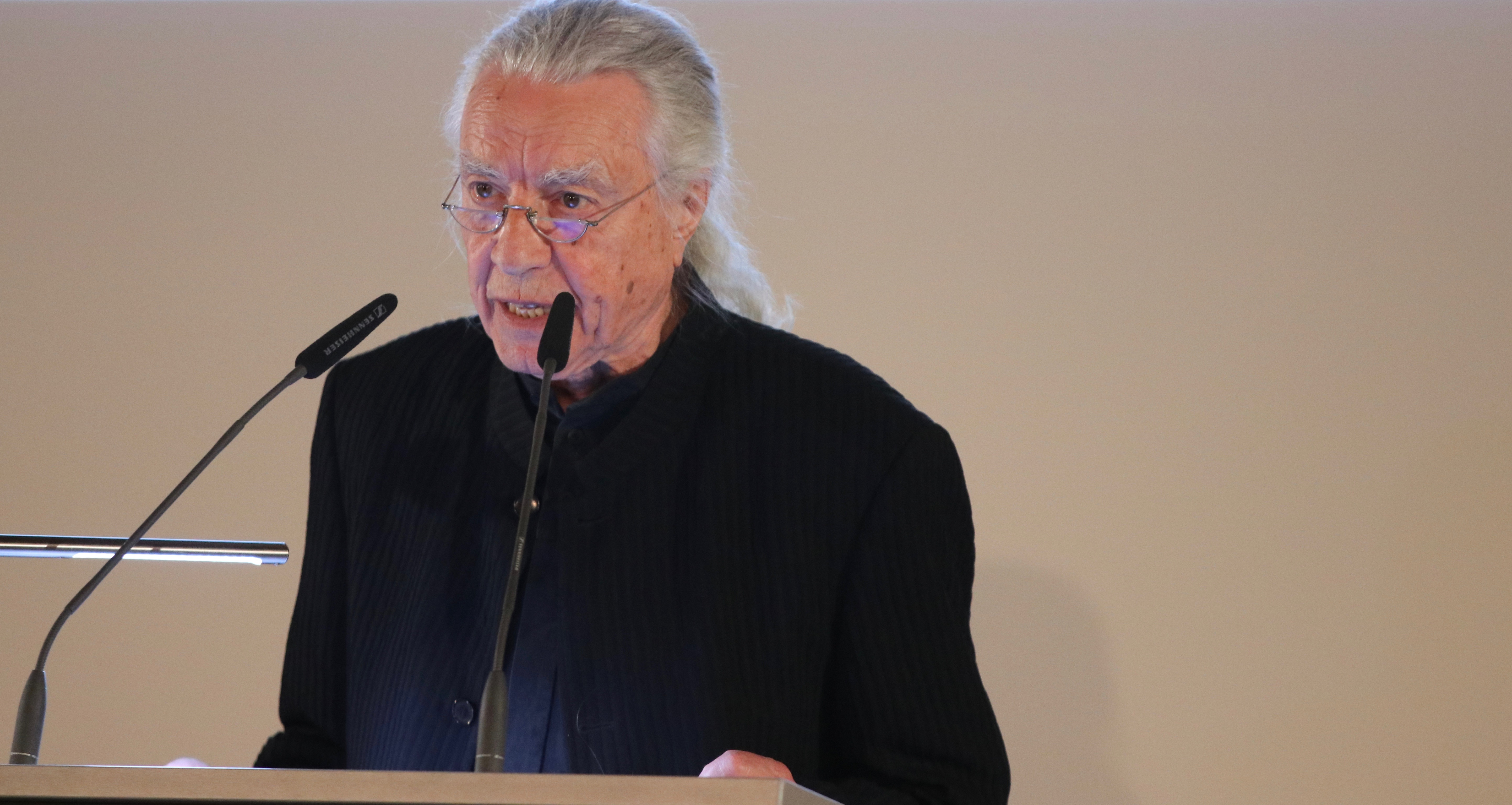 Dieter Dorn, Laudator auf Gerhard Polt, bei der Verleihung des Kulturellen Ehrenpreises der Landeshauptstadt München 2019